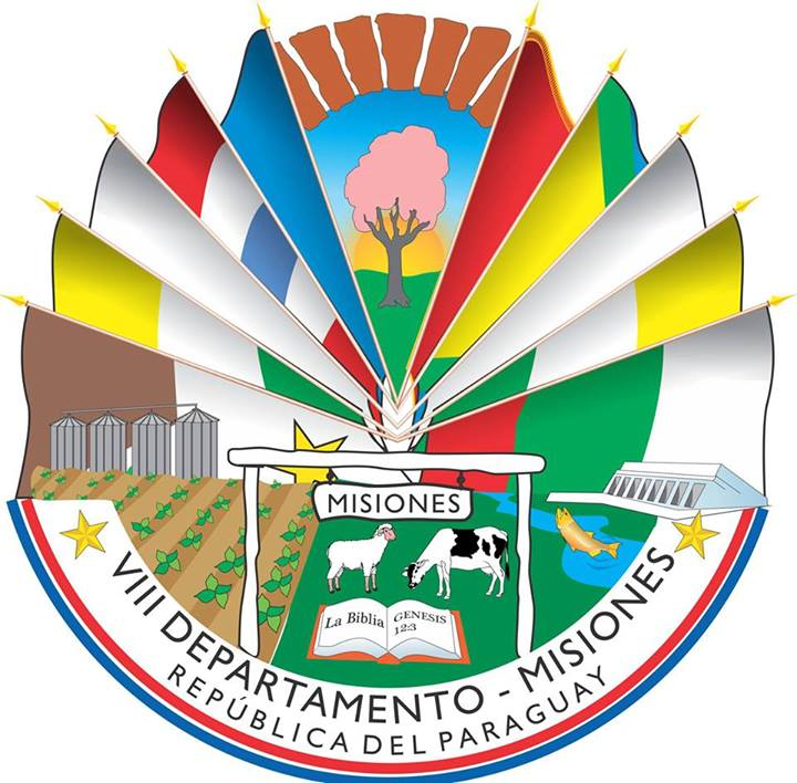 Escudo del Departamento de Misiones, Paraguay